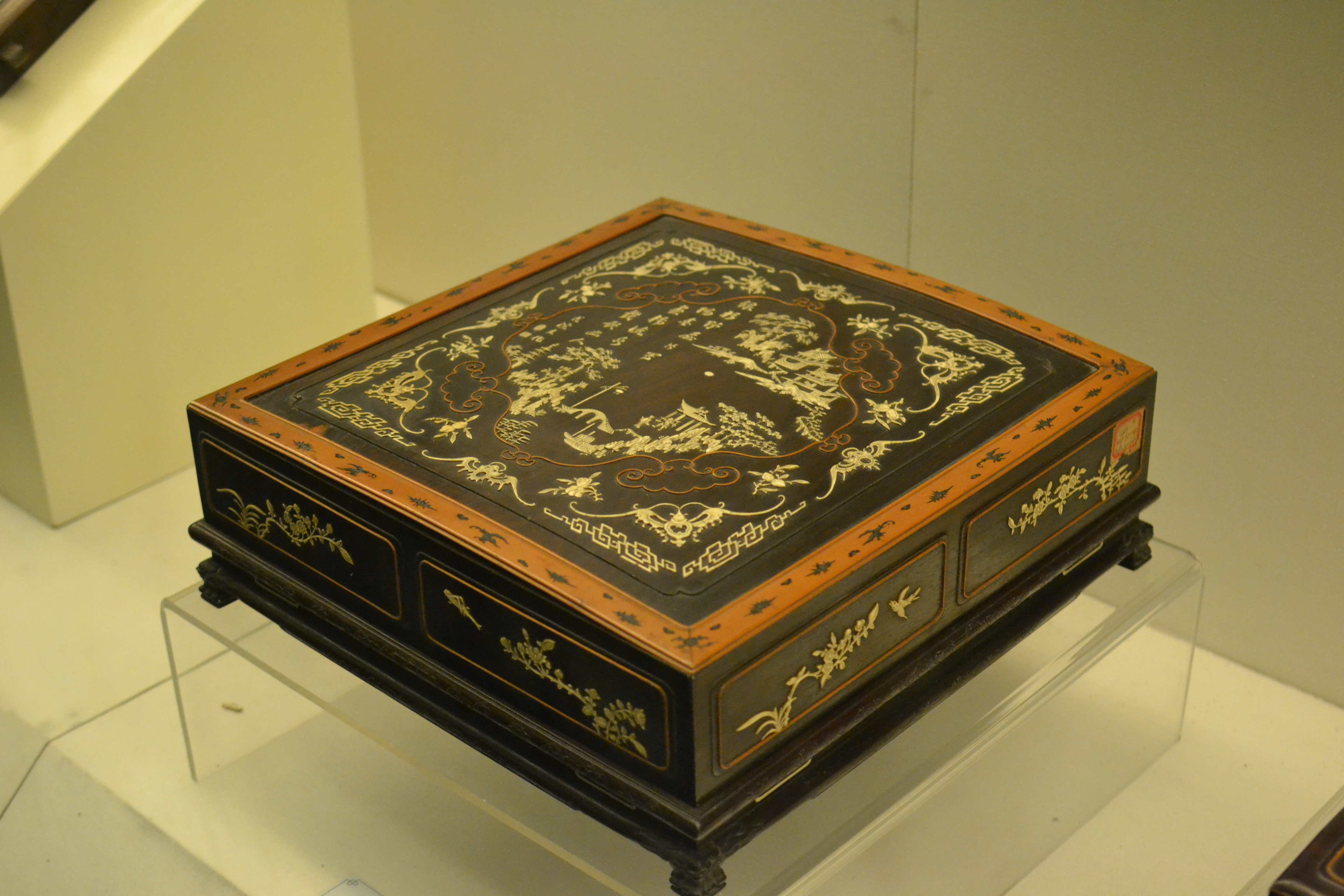 宁波博物馆 骨木镶嵌盒